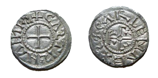 Denier de Carloman II Château-Landon. CARLEM REXS CASTIS HANNI.S Monogramme: KRLS 1.73gr - 21mm. Trésor de Gravigny- Collection H.Garnier.